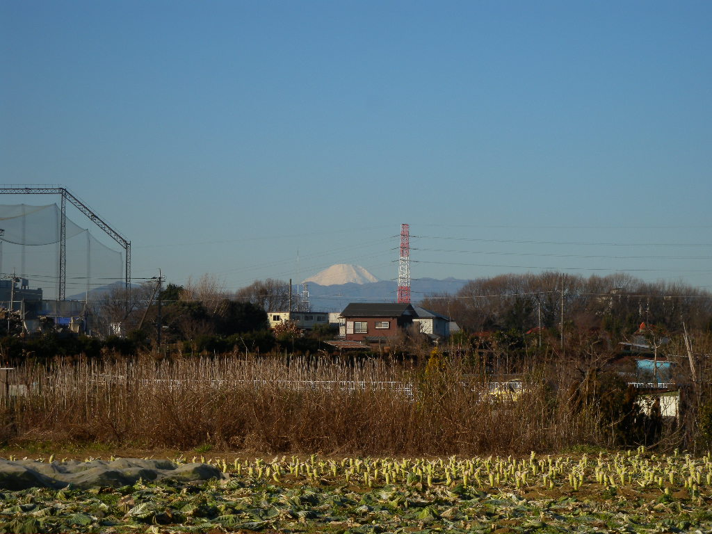 久末団地バス停付近・富士山を望む